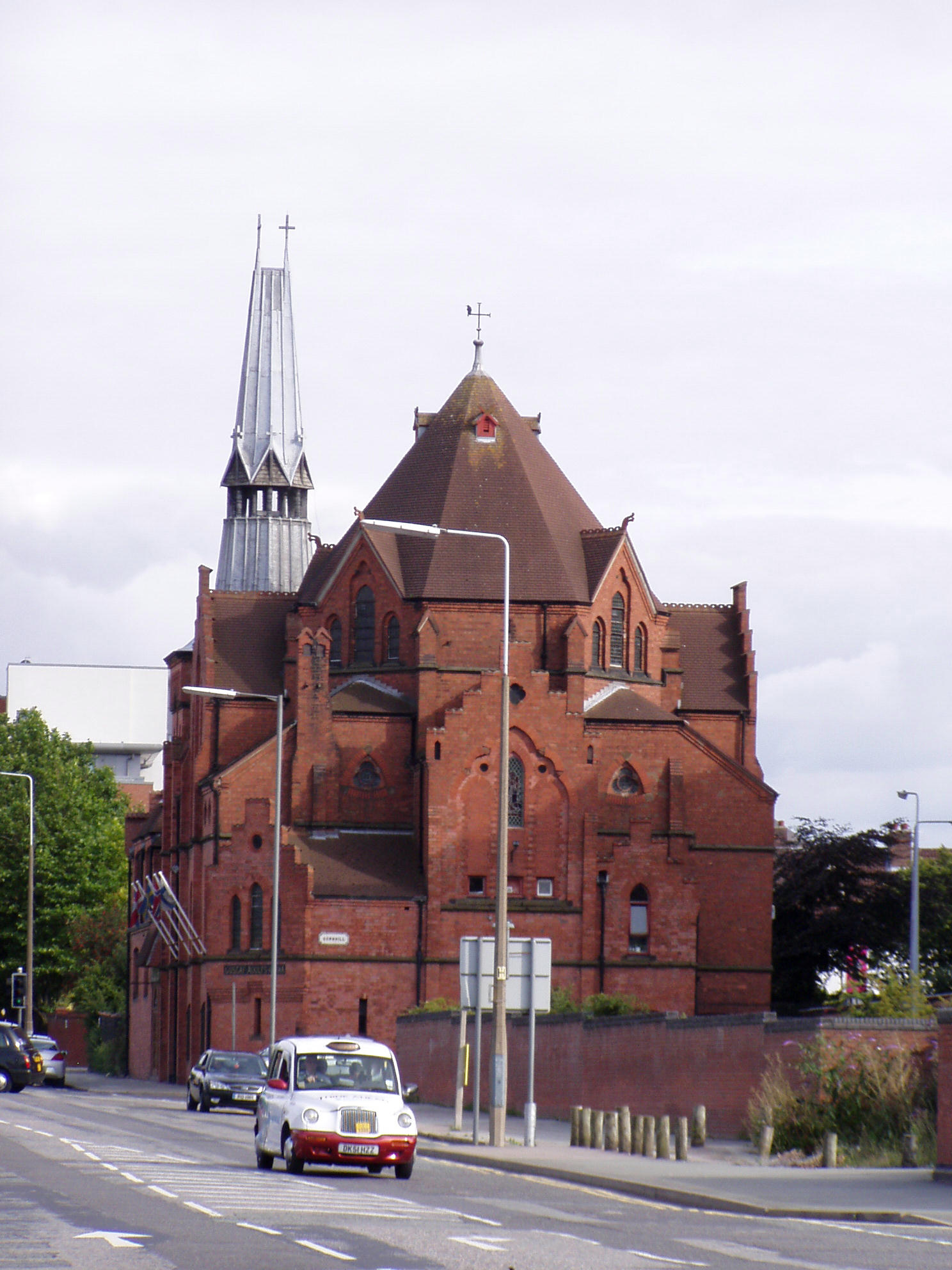 Gustav Adolfus Kyrka, Liverpool